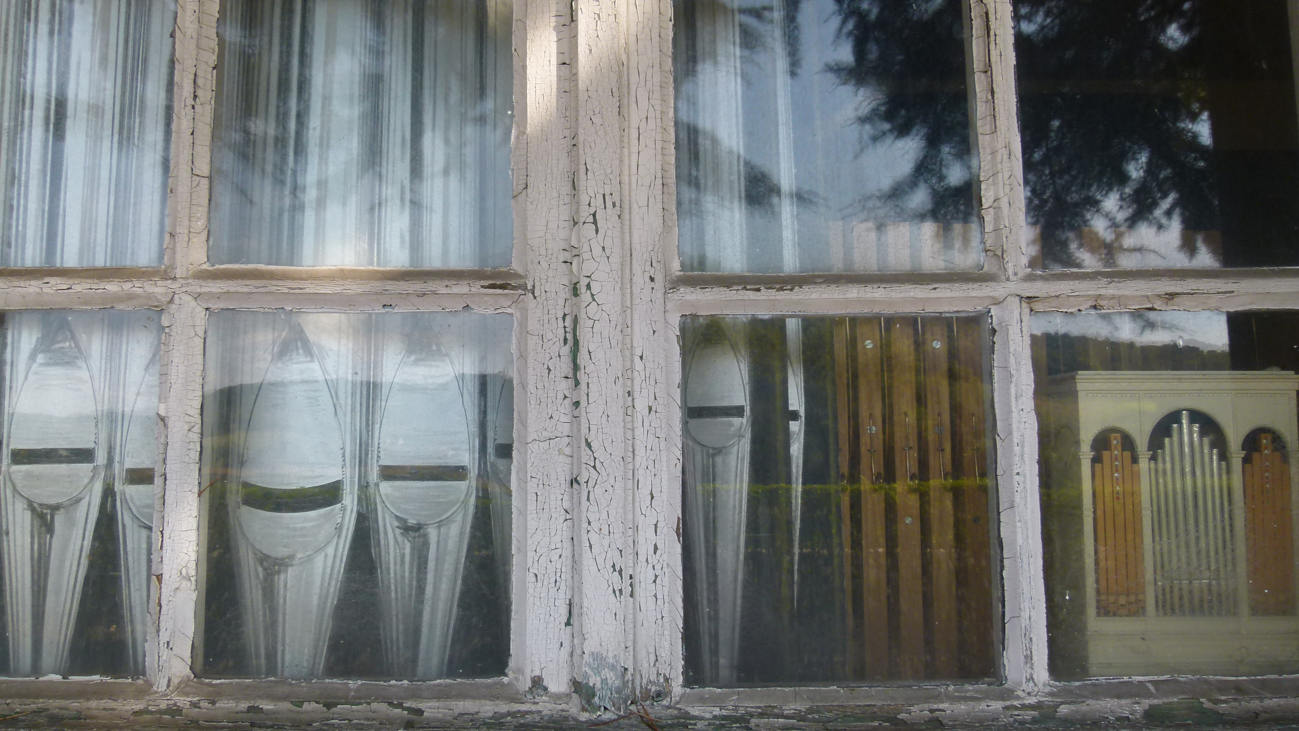 Uergelfabrik Lëntgen Fënster